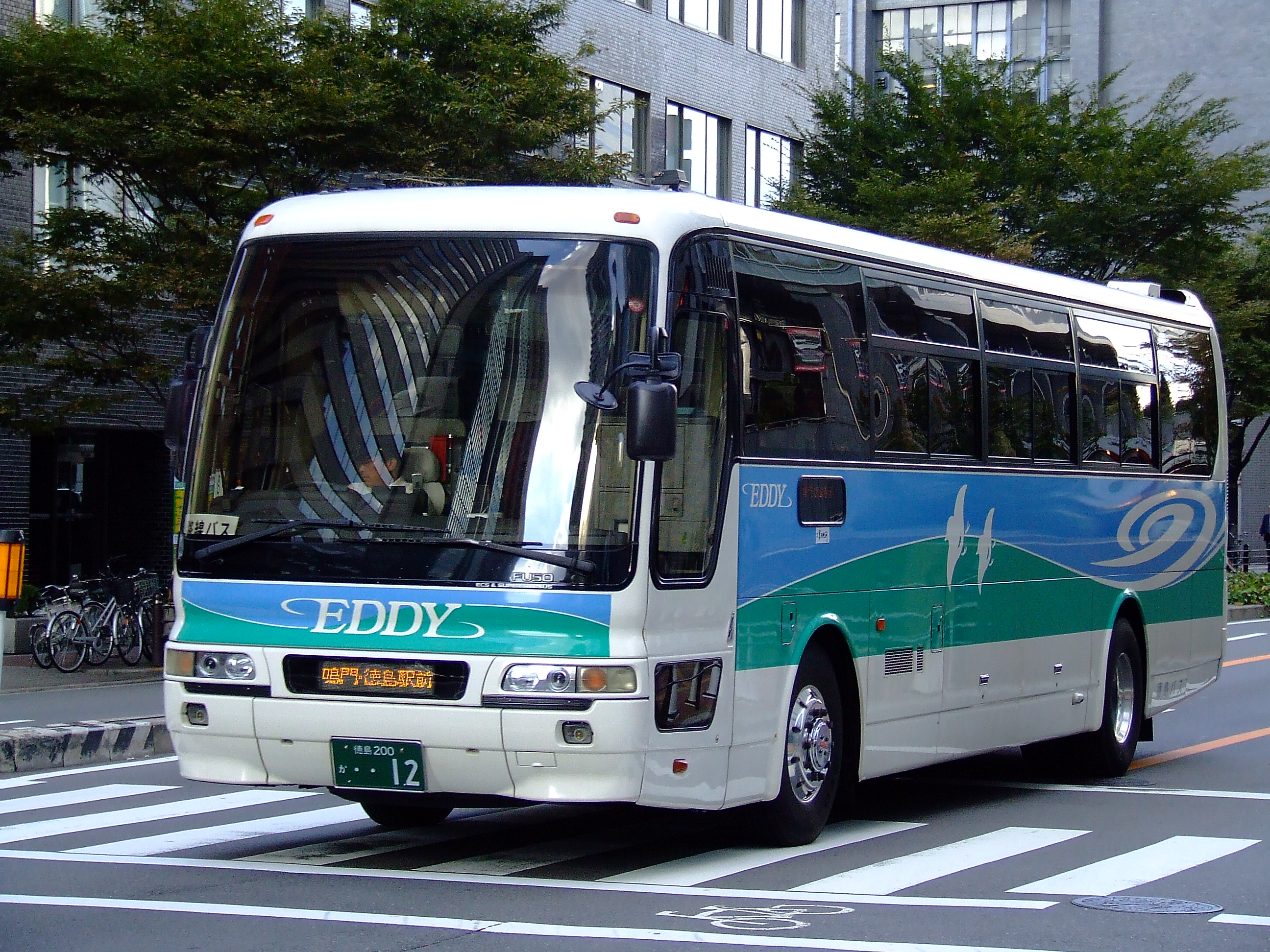 徳島バスの高速バス車両（関西方面路線向け） 大阪梅田（ハービスOSAKA）付近にて